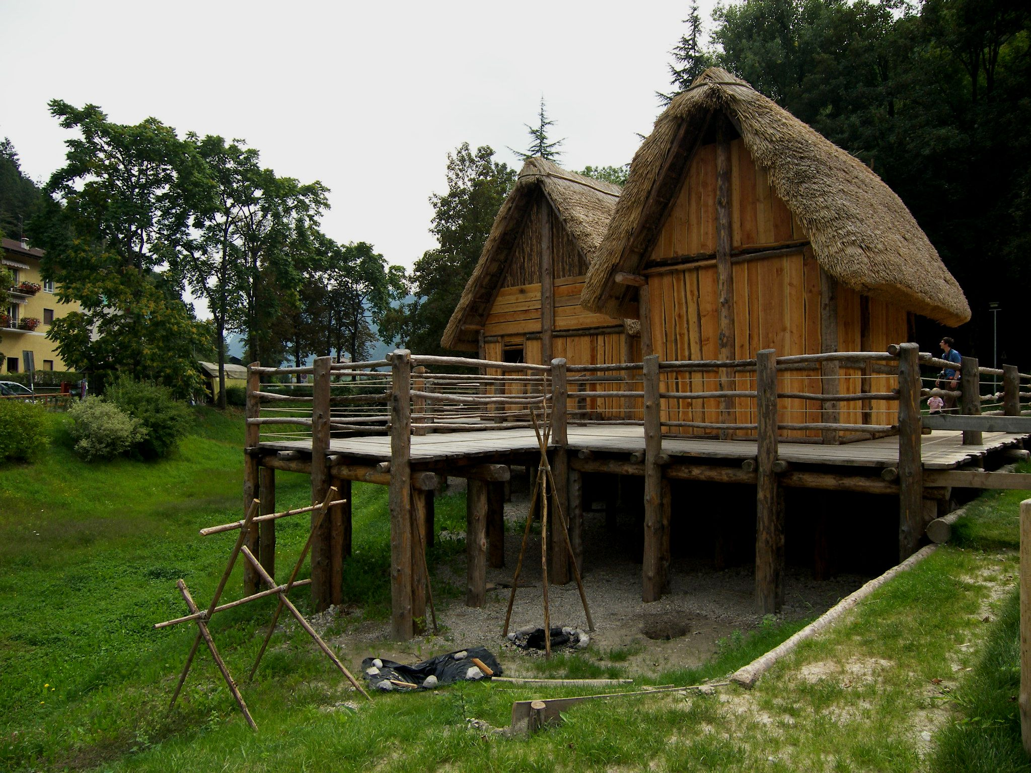 Ledrosee: Pfahlbauten originalgetreu